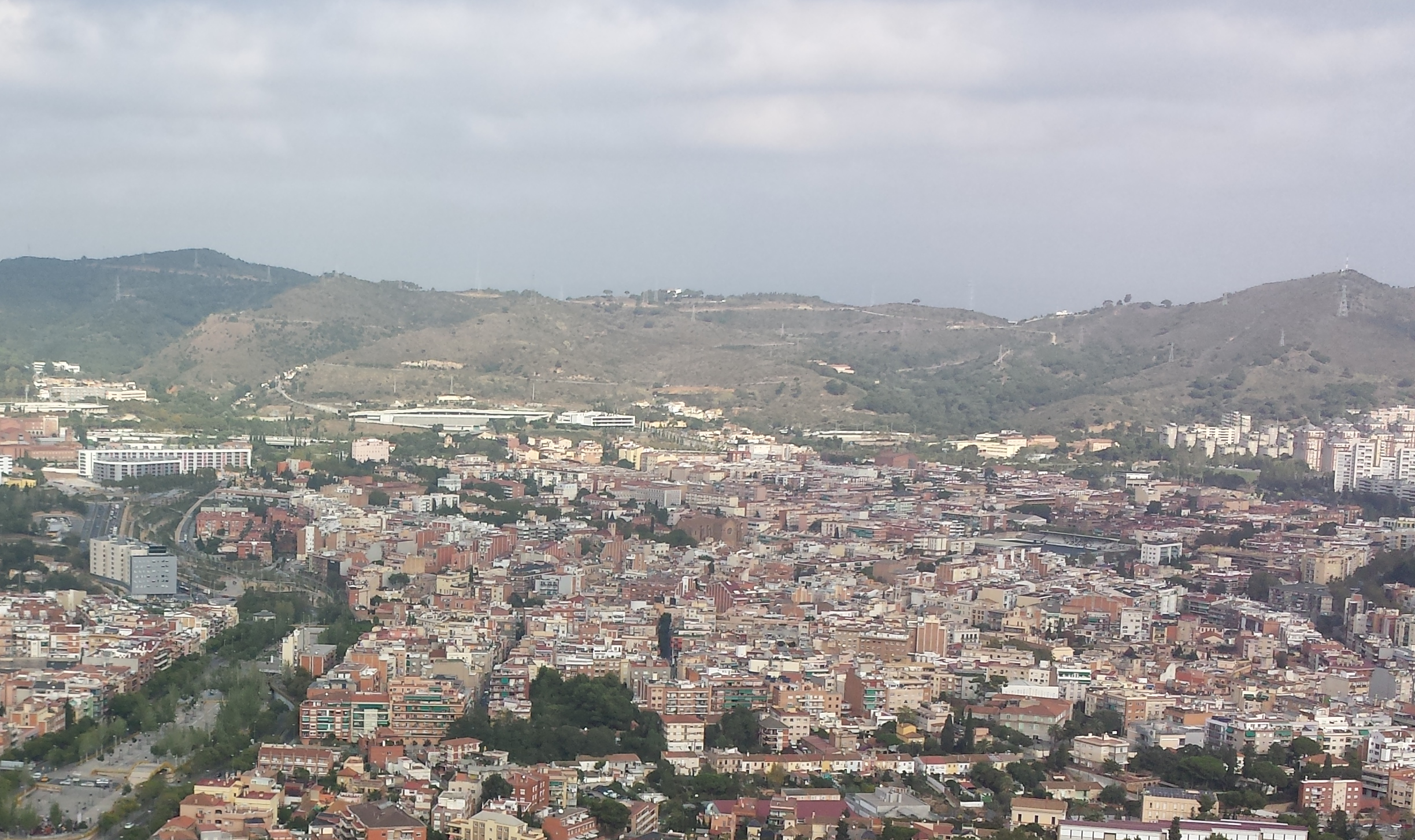 Letecký pohled na městskou část Horta v Barceloně